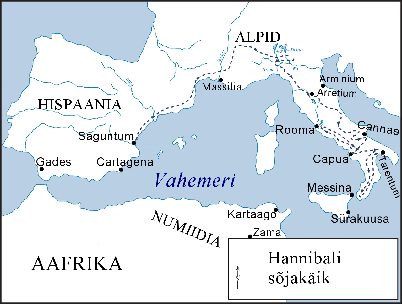 Tõlkisin veidi